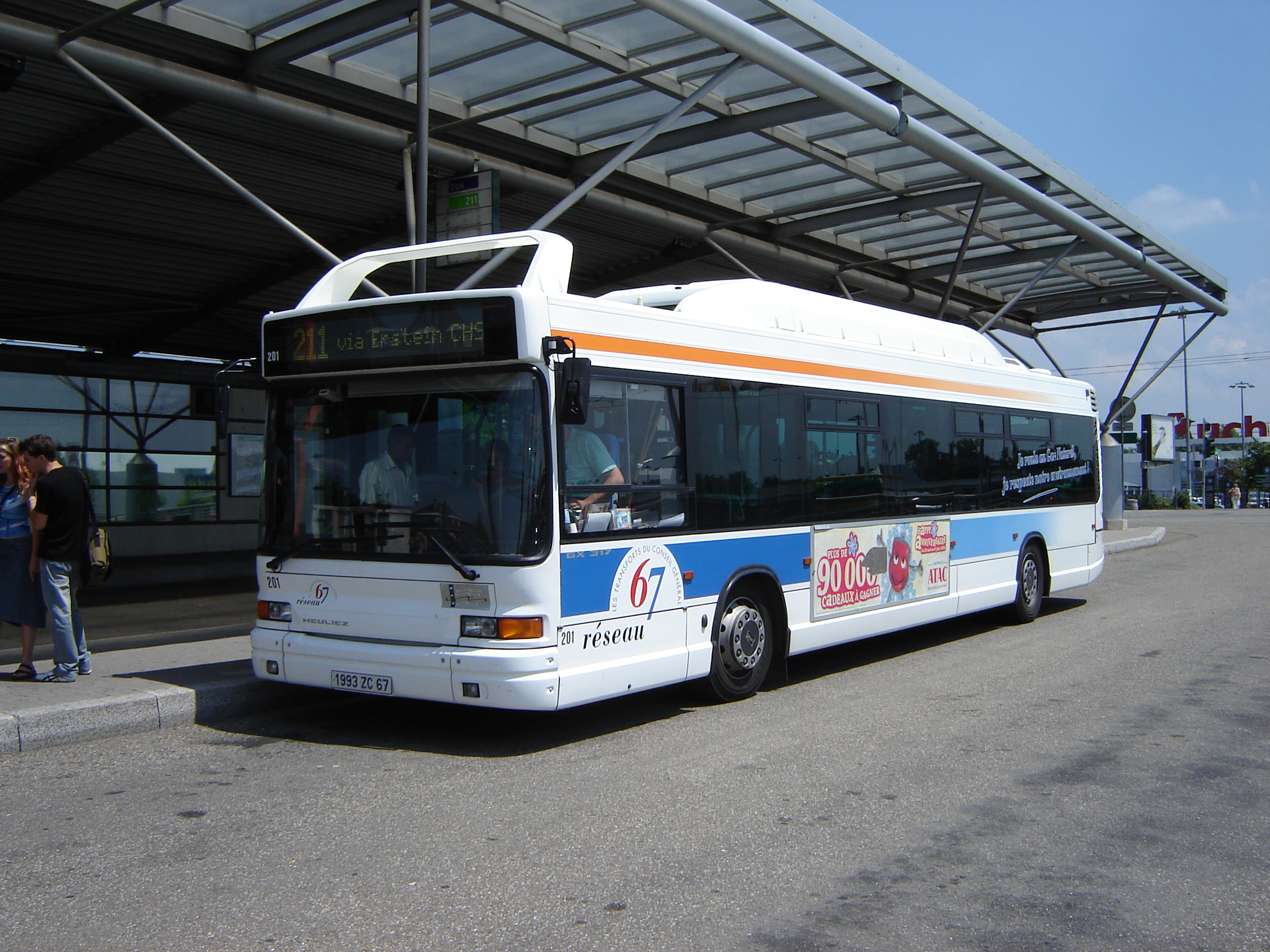 GX 317 GNV servant sur le Réseau 67